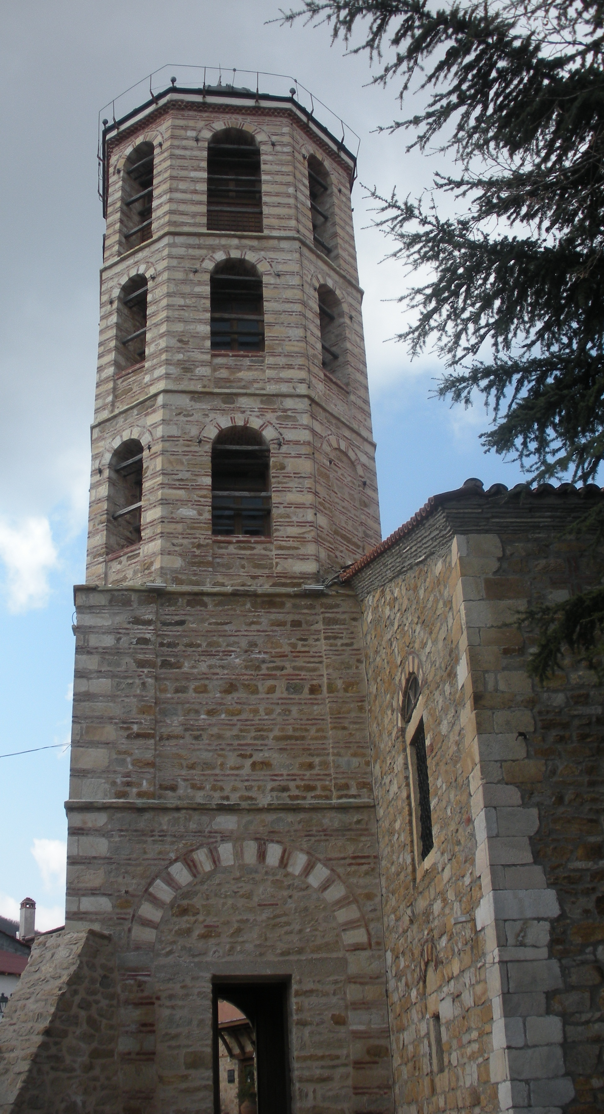 Το καμπαναριό του Αγ. Στεφάνου (1889) στην Αρναία